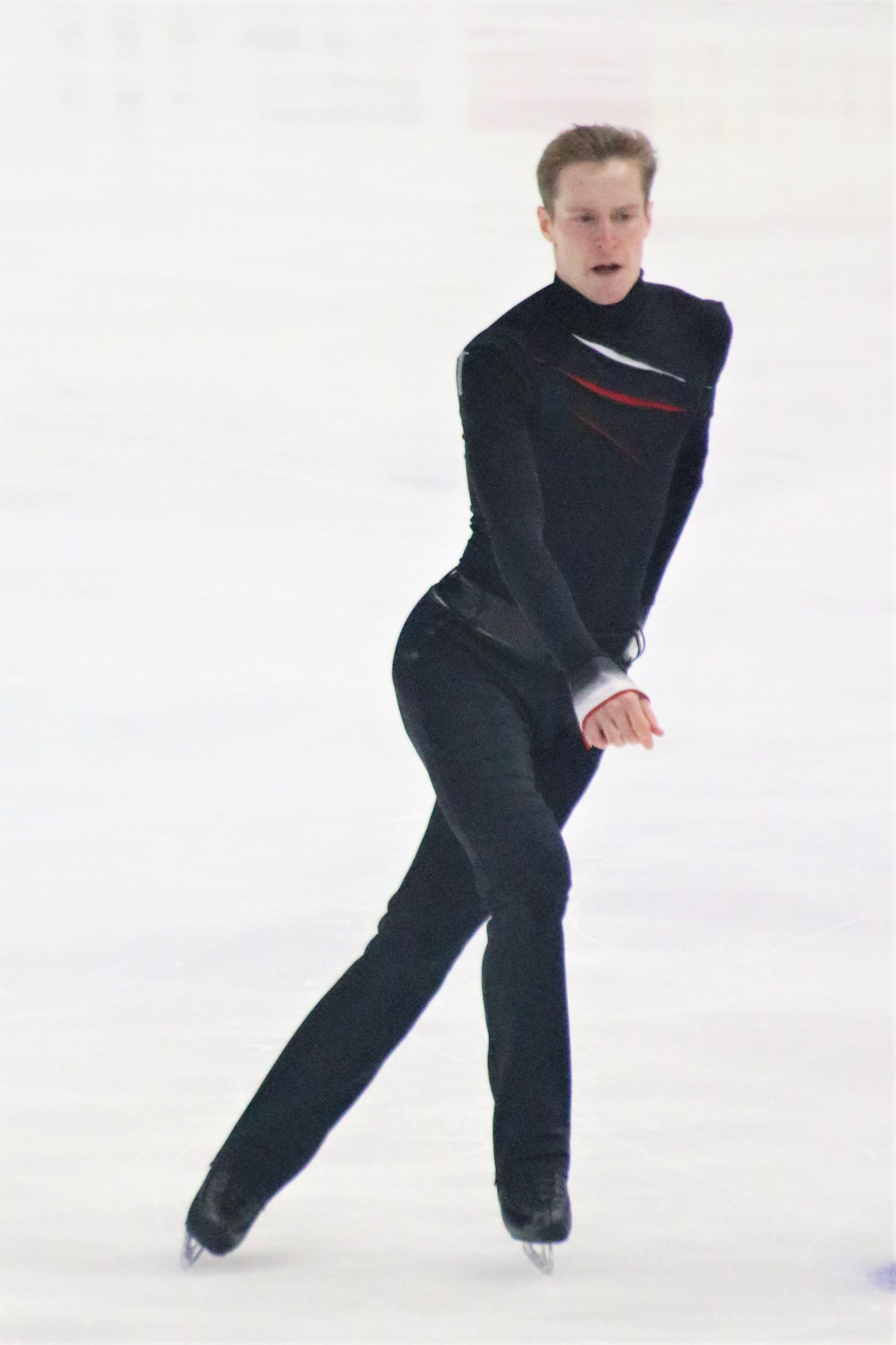 Александр Самарин (Россия) на Rostelecom Cup 2019